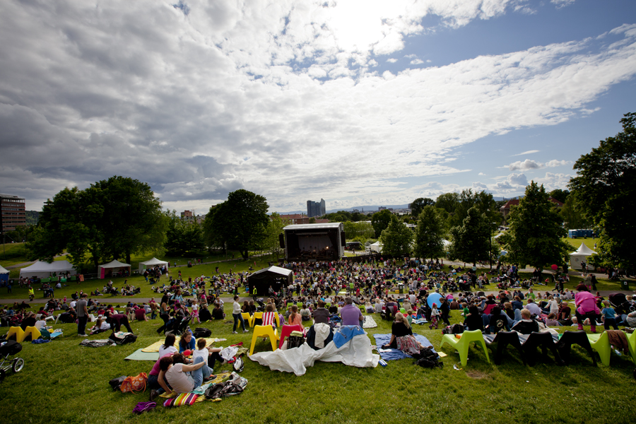 Hovedscenen på Miniøya, tatt av fotograf Gundersenogmeg (c) Miniøya